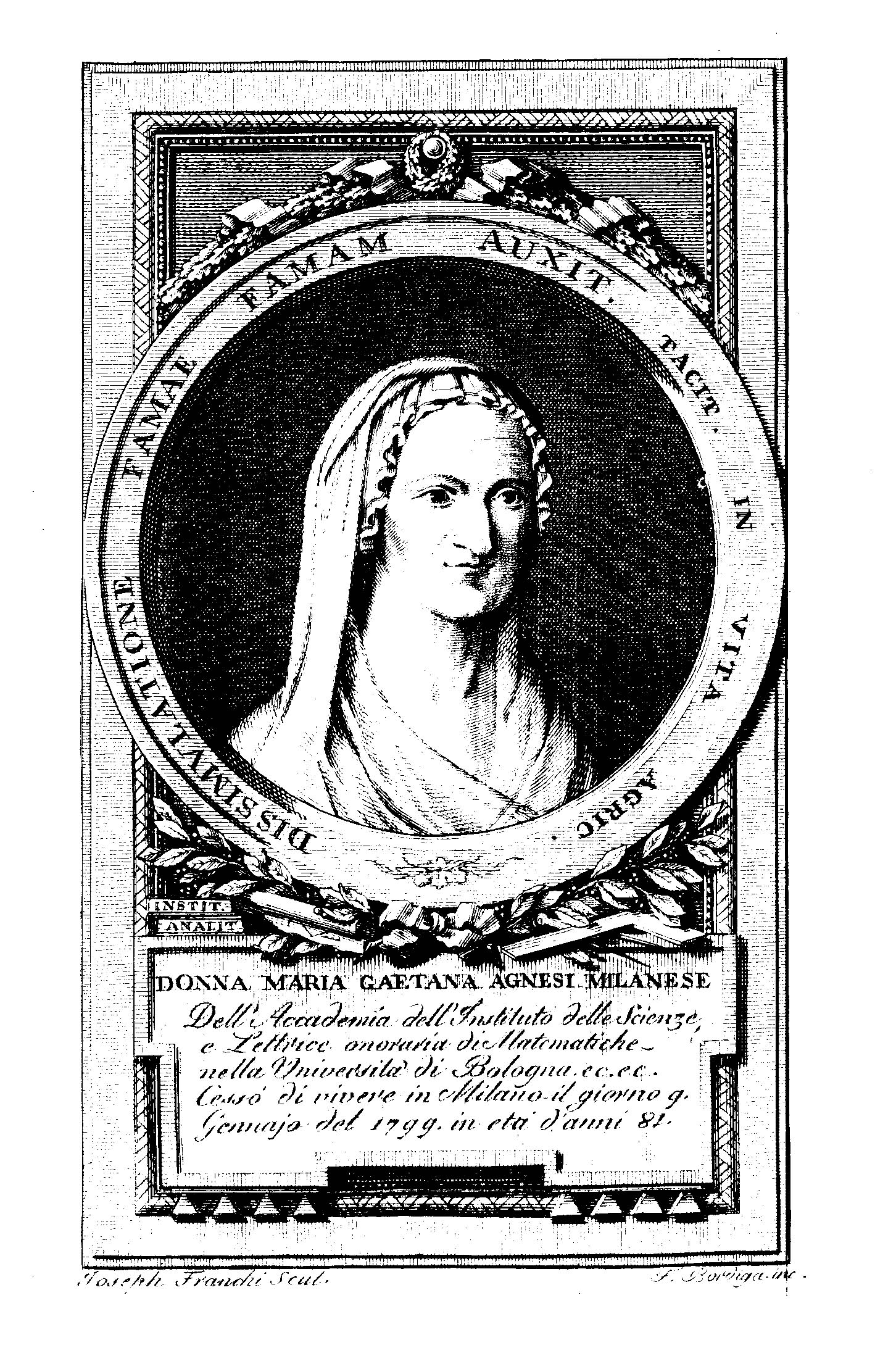 Elogio storico di D.a Maria Gaetana Agnesi milanese dell'Accademia dell'Istituto delle Scienze, e lettrice onoraria di matematiche nell'Universita di Bologna. - Milano : presso Giuseppe Galeazzi, 1799. - 116 p., [1] c. di tav. : ritratto ; 20 cm .